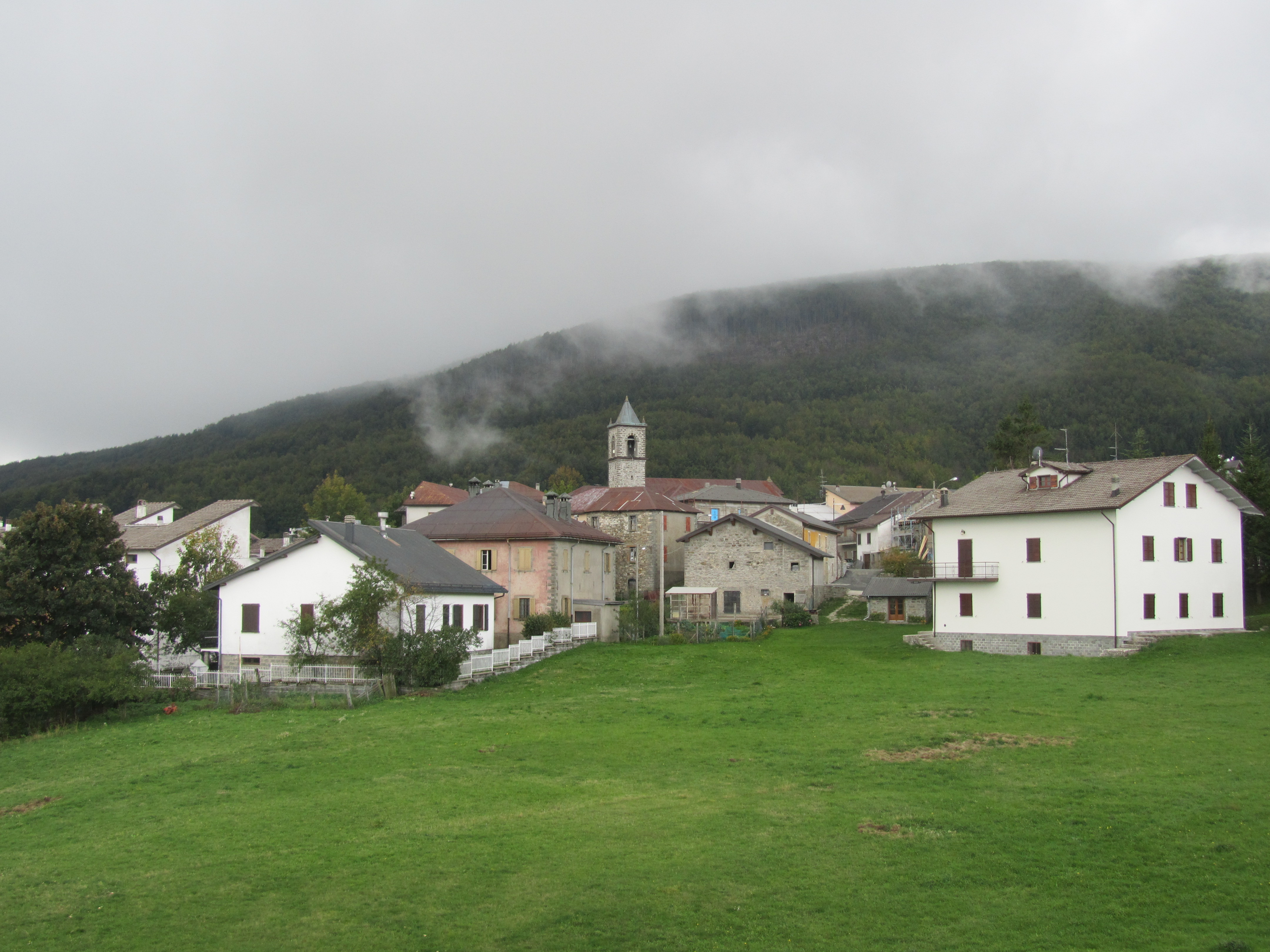 Panorama di Rigoso, Monchio delle Corti (PR)